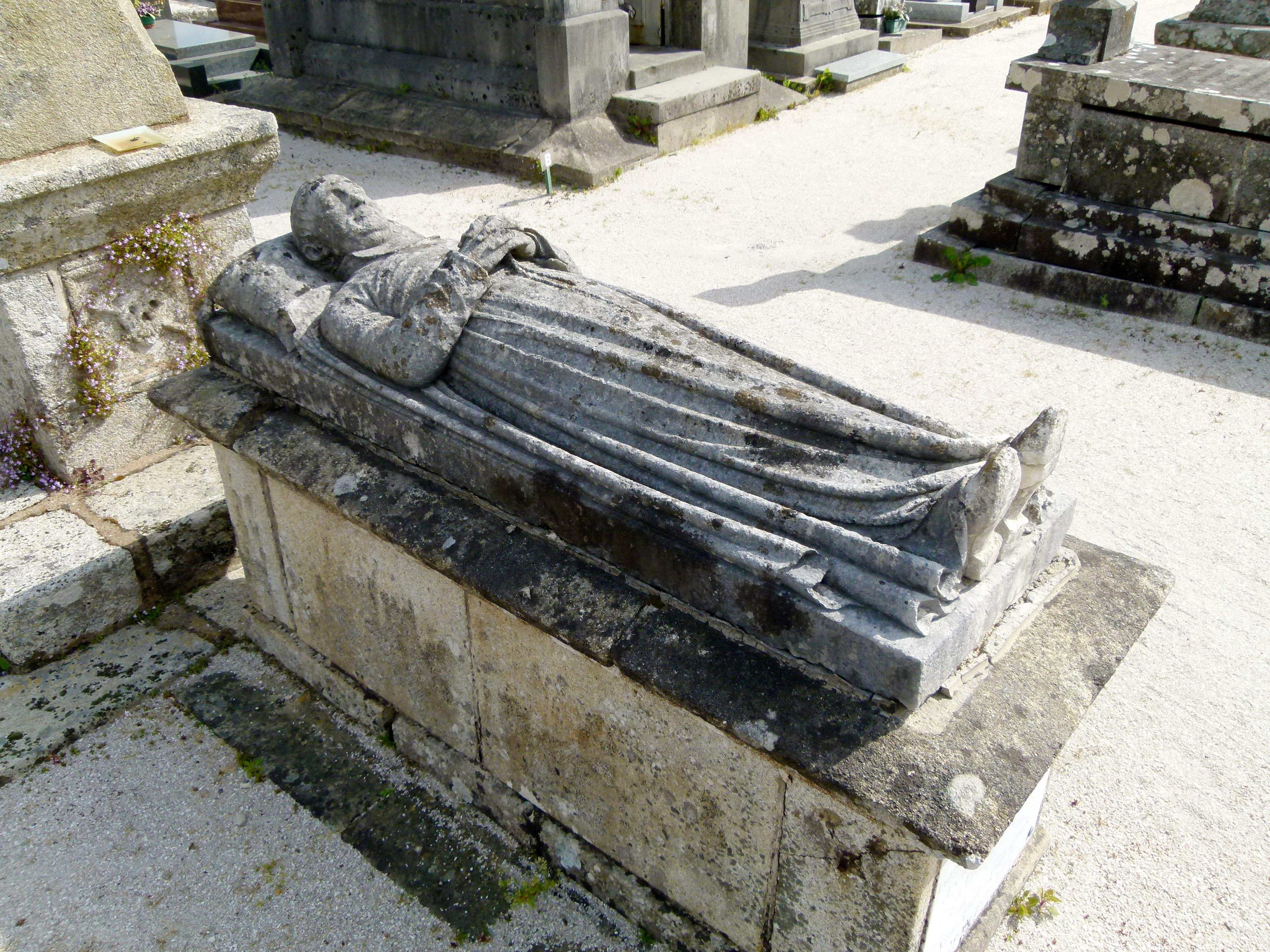 Gisant du curé Pierre Guillozo au cimetière de Languidic